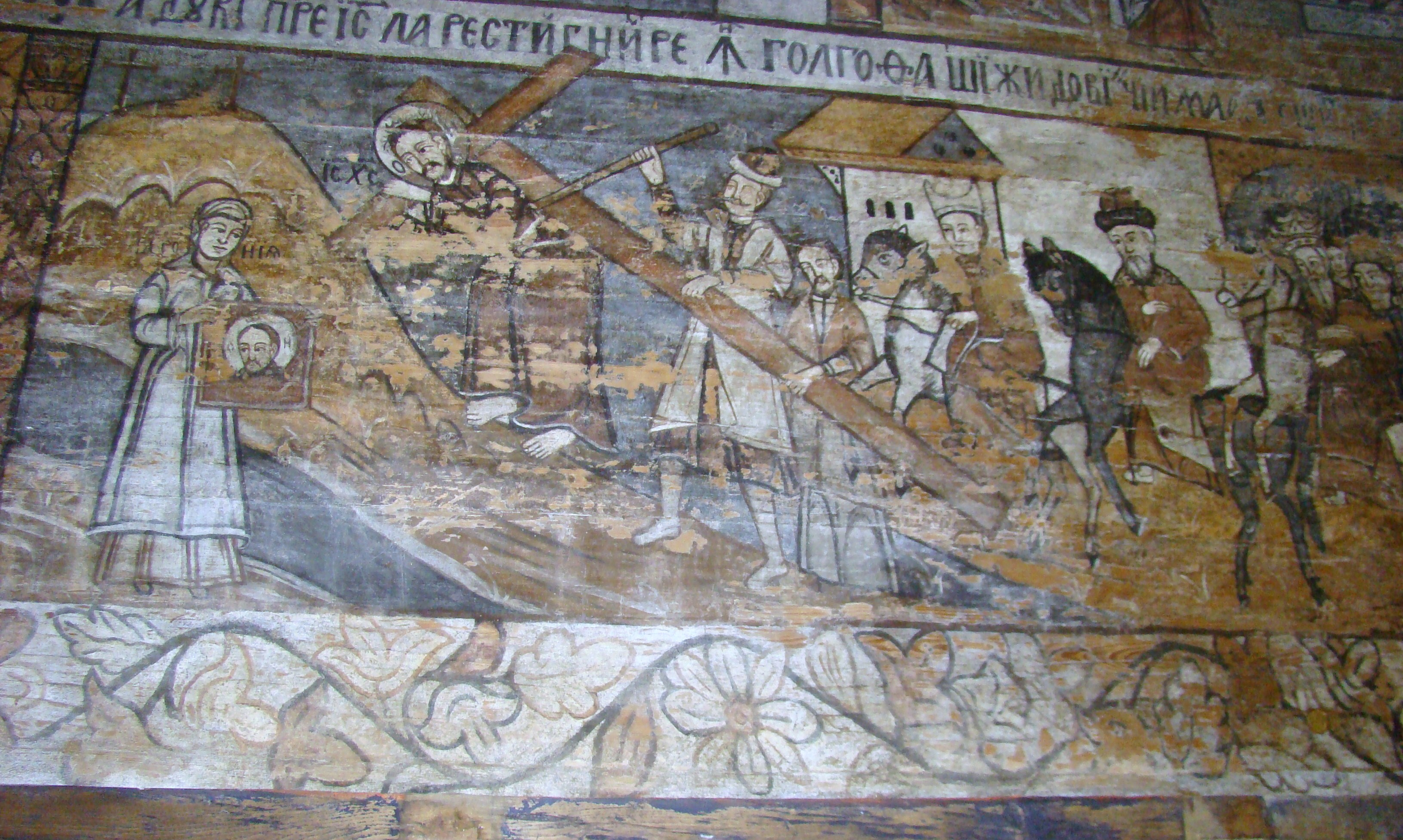 Biserica de lemn "Naşterea Maicii Domnului", sat IEUD